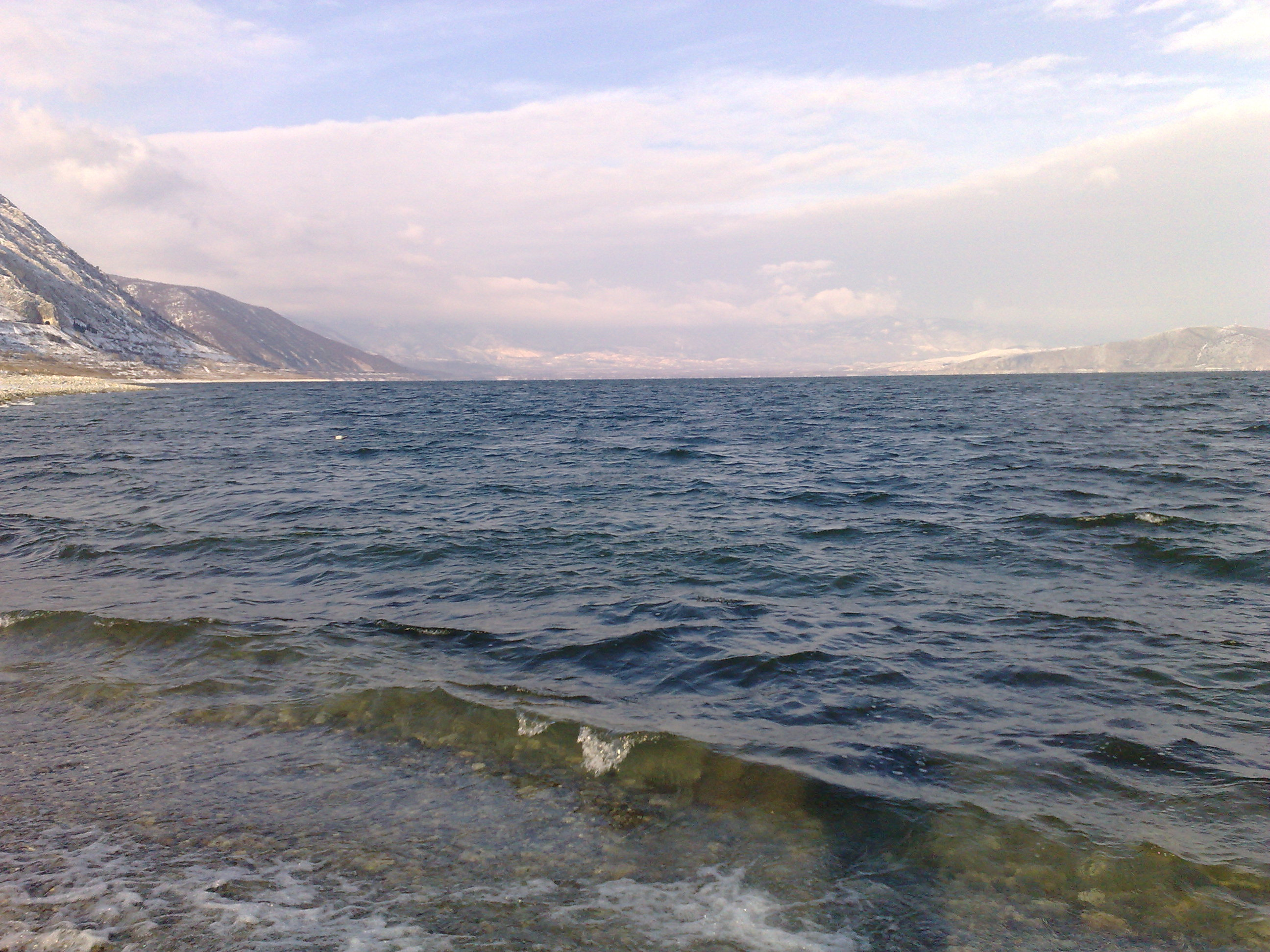 Blick nach Norden über den Vegoritida-See von Agios Pandelemionas; Griechenland